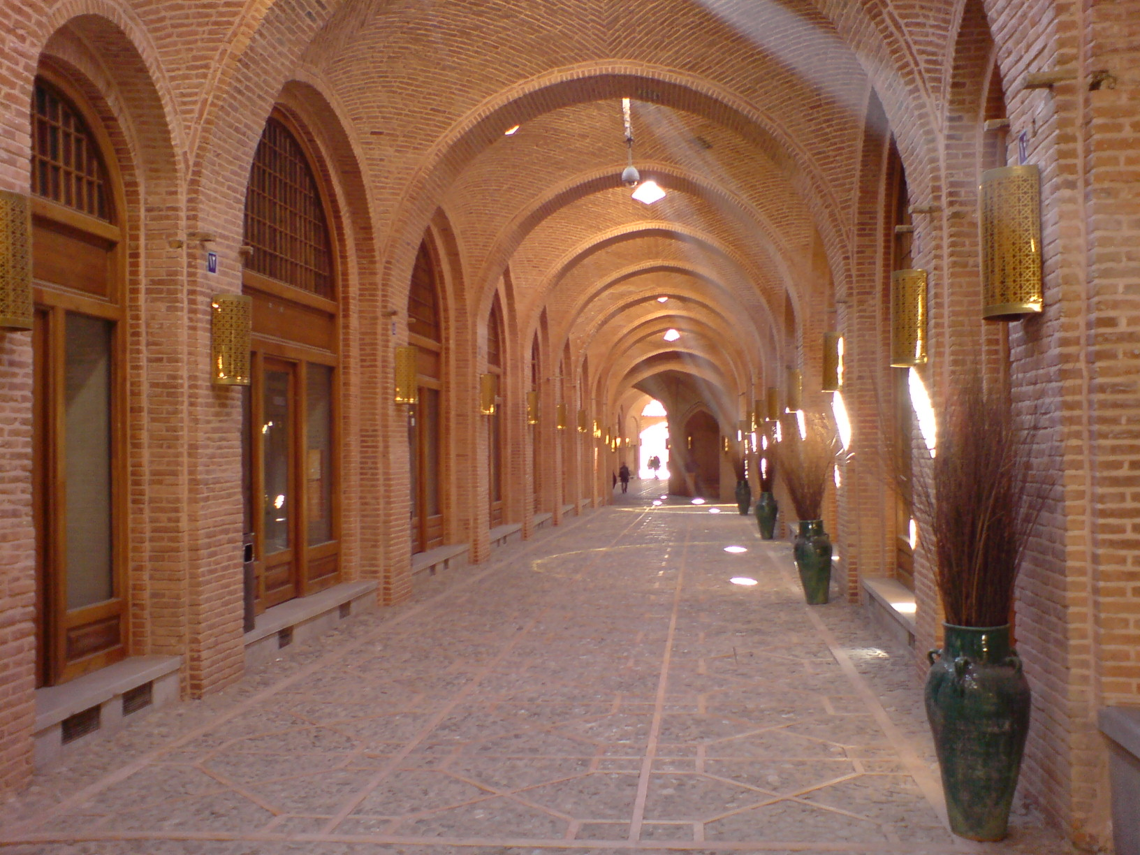 سرای وزیر1